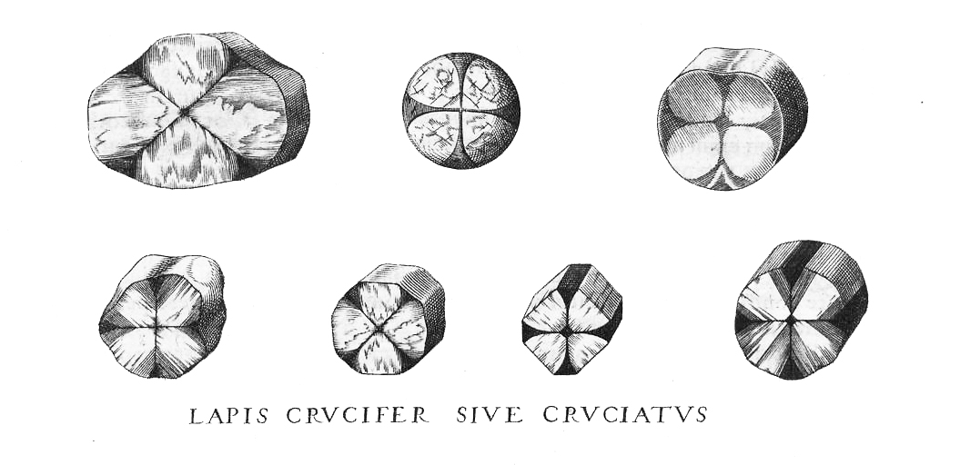 Grabado de Eisenhot, en la Metallotheca de Mercati 1717